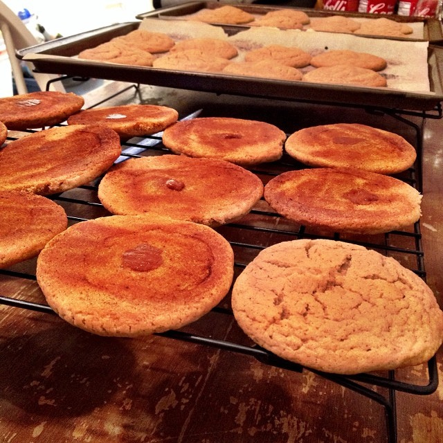 Caramel stuffed apple cider cookies